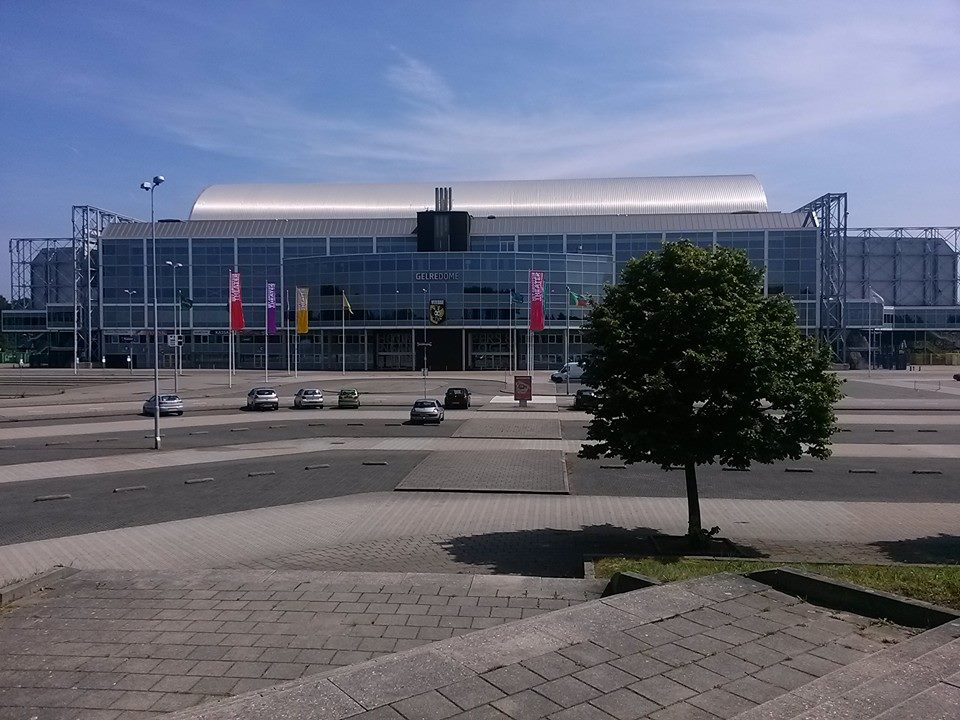 Gelredome en het Vitesse stadion in 2014